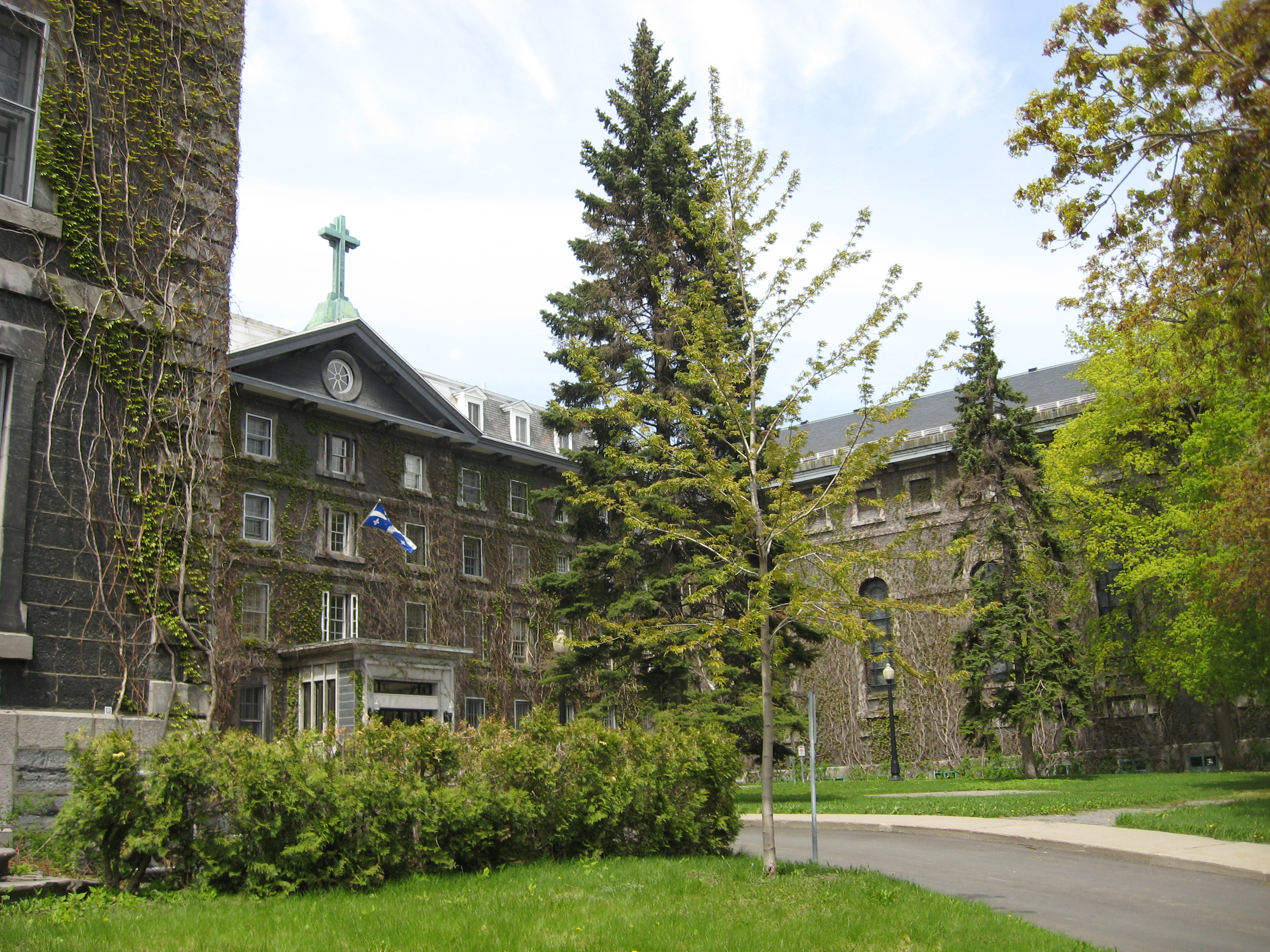 Entrée du Grand séminaire de Montréal